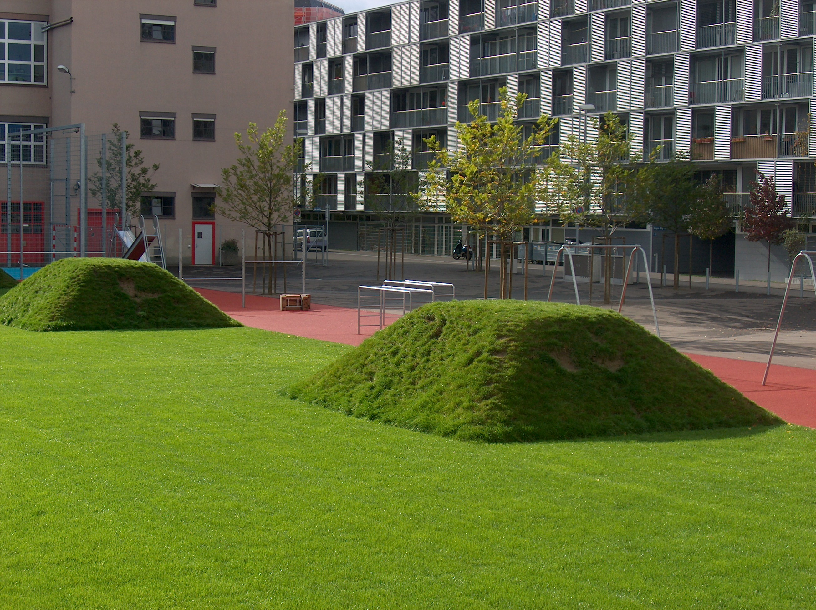 Rasenfeld